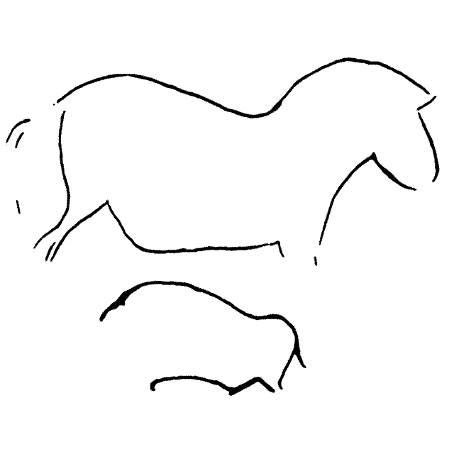 Caballo y bisonte grabados en la Cueva de Hornos de la Peña, en Tarriba (Cantabria, España)